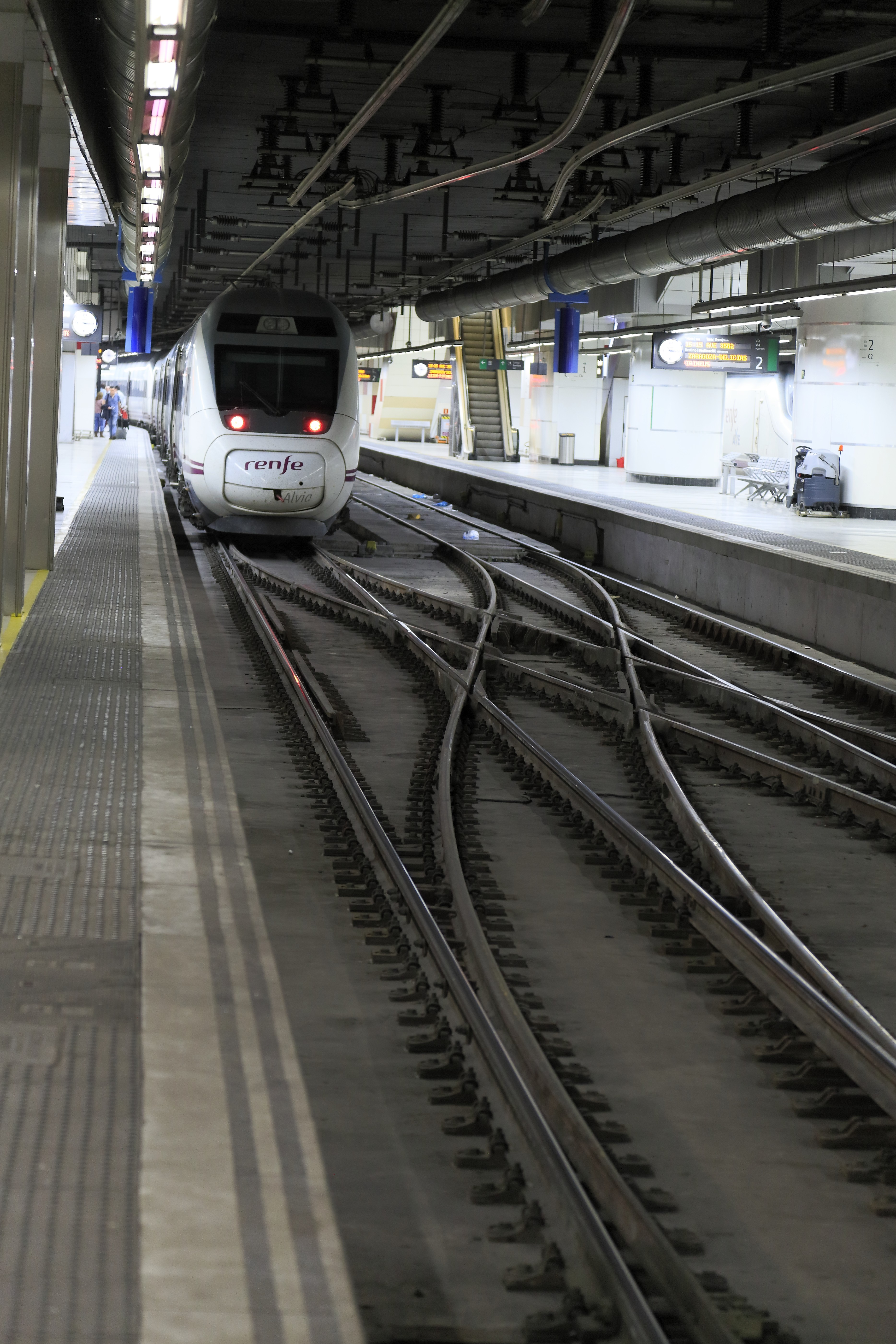 Regelspurgleise 2 und 3 mit doppelter Gleisverbindung zur Doppelausnutzung der Bahnsteiggleise, im Hintergrund ein CAF-Triebzug der Reihe 121 vor der Fahrt nach Bilbao Abando